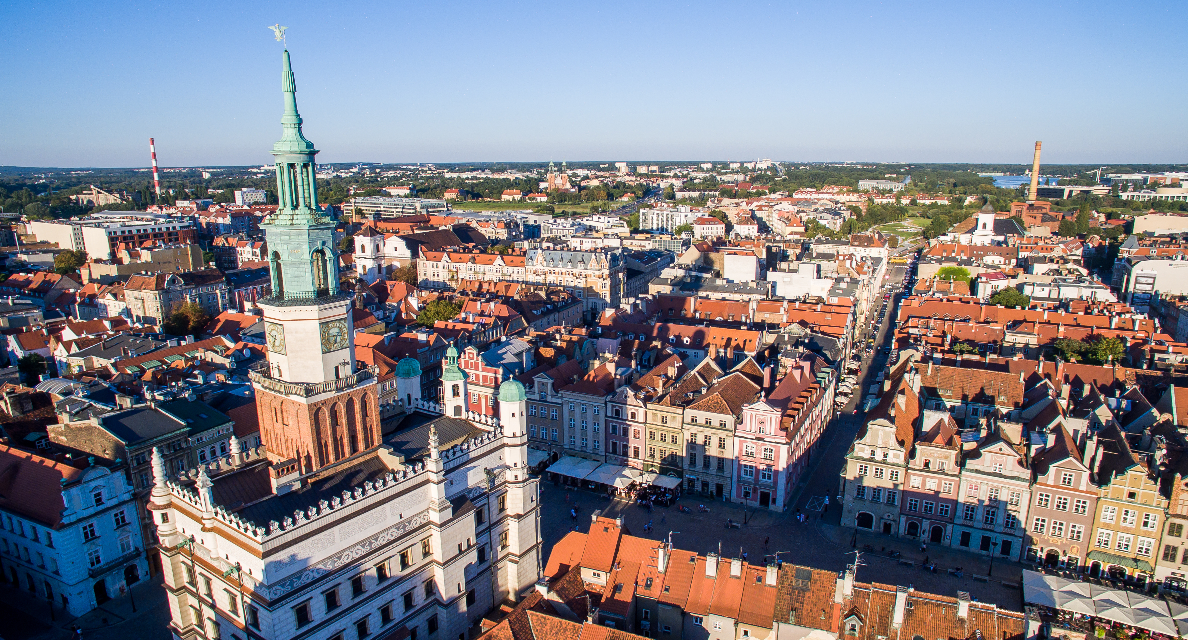 Widok na Ratusz i Stare Miasto w Poznaniu z nietypowej perspektywy.